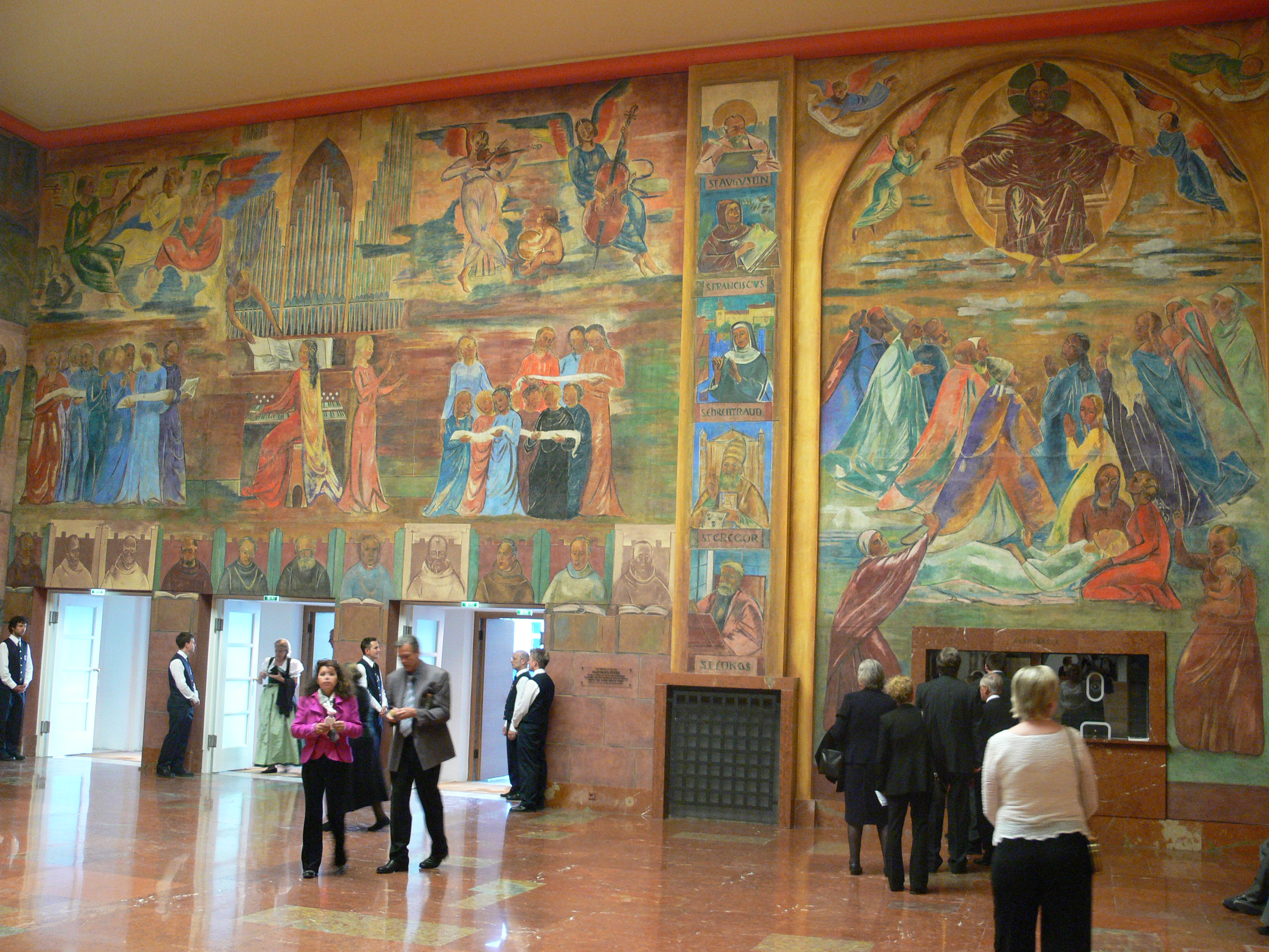 Salzburg, Festspielhauskomplex, Haus für Mozart (Kleines Festspielhaus) Faistauer-Foyer mit Wandbildern von Anton Faistauer (1887–1930)